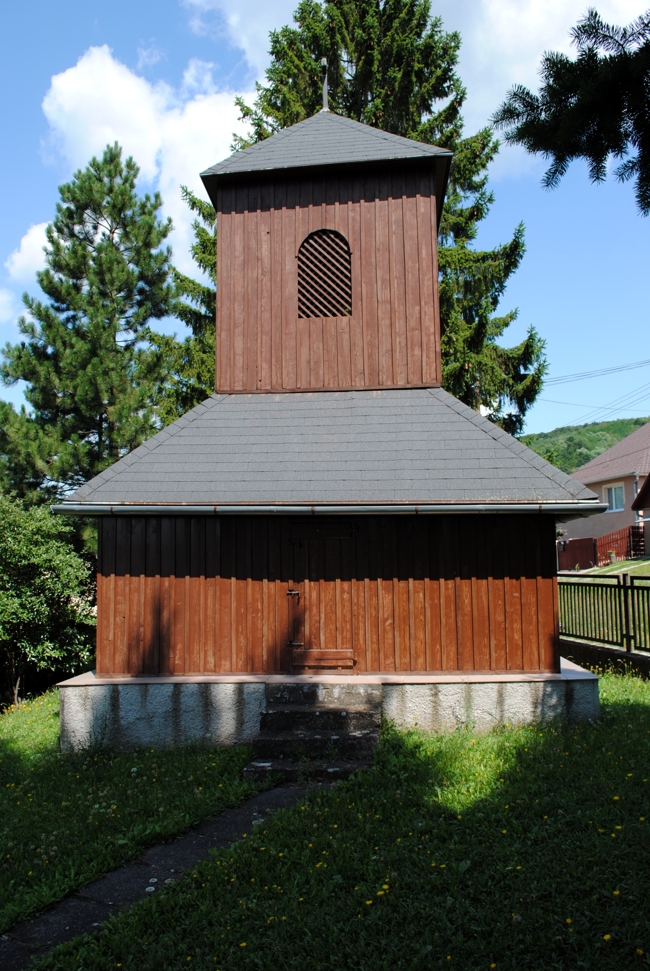 Ipolyfödémes